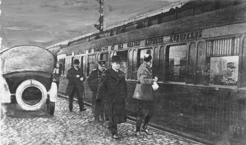 Erzberger auf dem Weg zu Waffenstillstandsverhandlungen Waffenstillstandsverhandlungen, Erzberger, Foch (Trier 16.1.1919)] Abgebildete Personen: Erzberger, Matthias: Reichsfinanzminister, Vizekanzler, Deutschland (GND 11853100X)